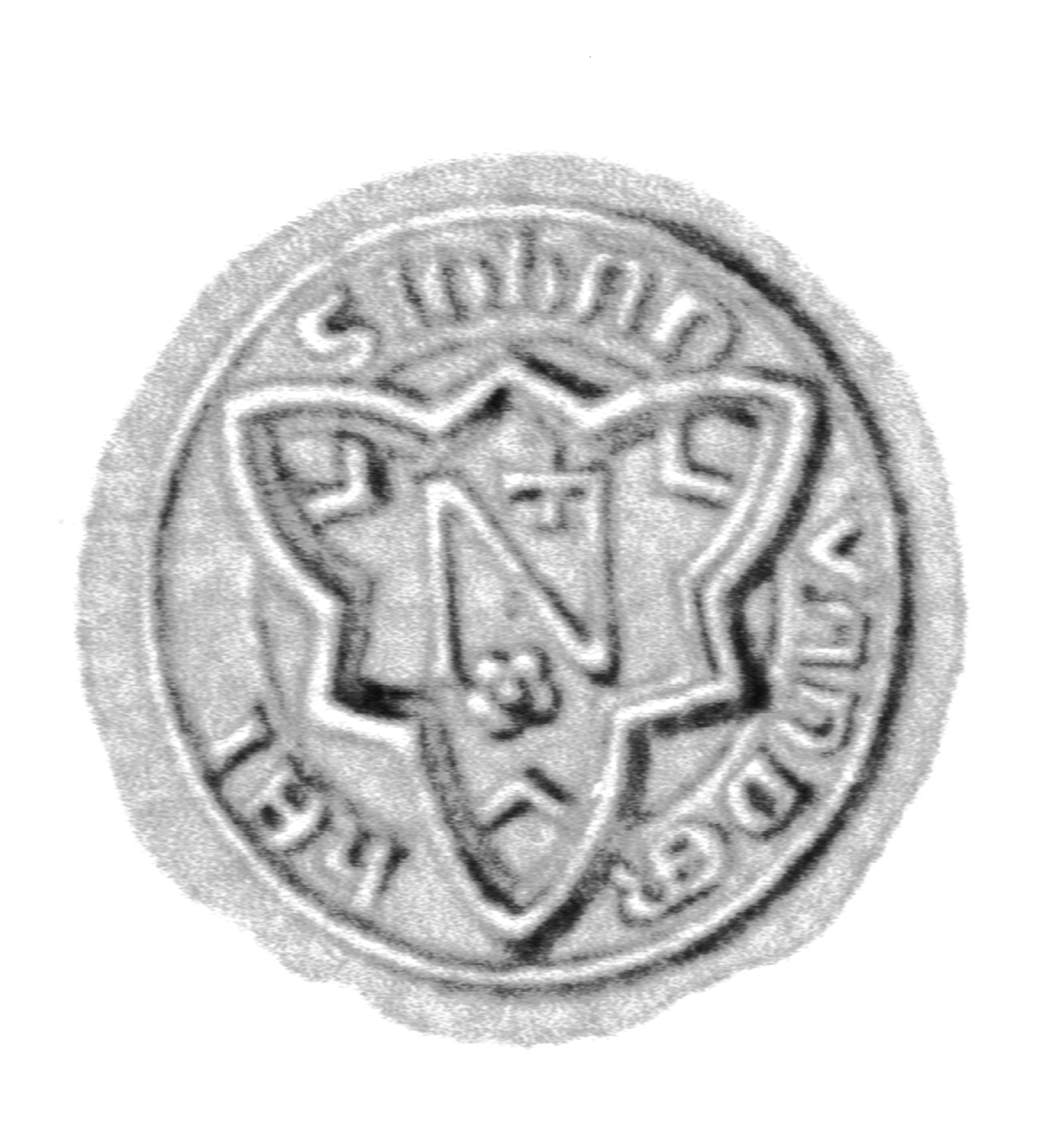 Siegel des Ratsmannes Johann von der Heide. Das Siegel stammt aus der Zeit um 1411. Siehe Emil Ferdinand Fehling: Lübeckische Ratslinie, Nr. 458 (Johann von der Heide).